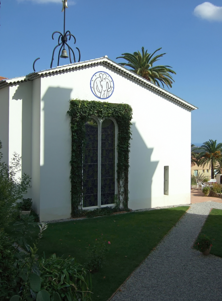 Entrata della cappella decorata da Matisse, a Vence.